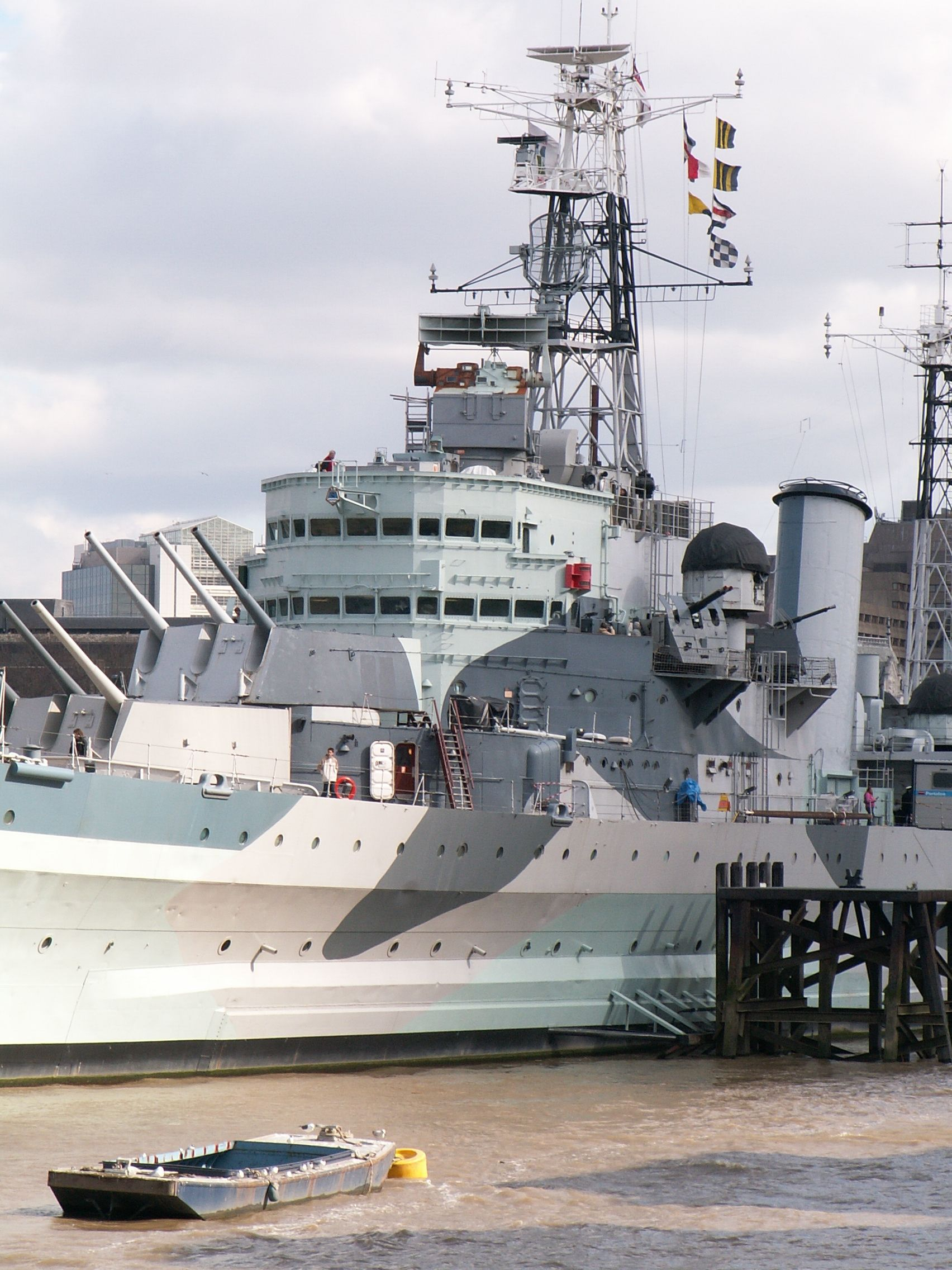 HMS Belfast, London